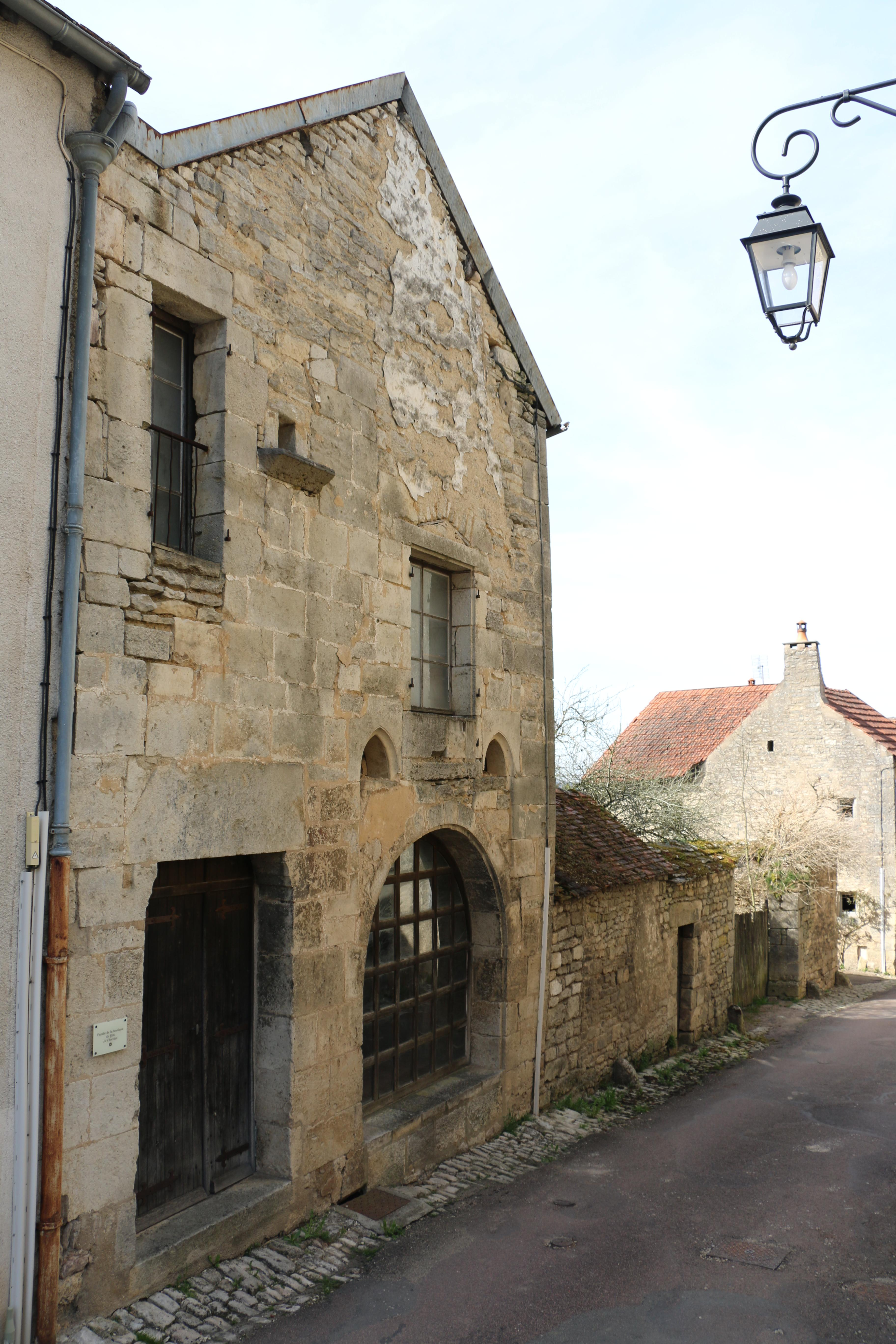 Filmkulisse für Film "Chocolat" in Flavigny-sur-Ozerain.